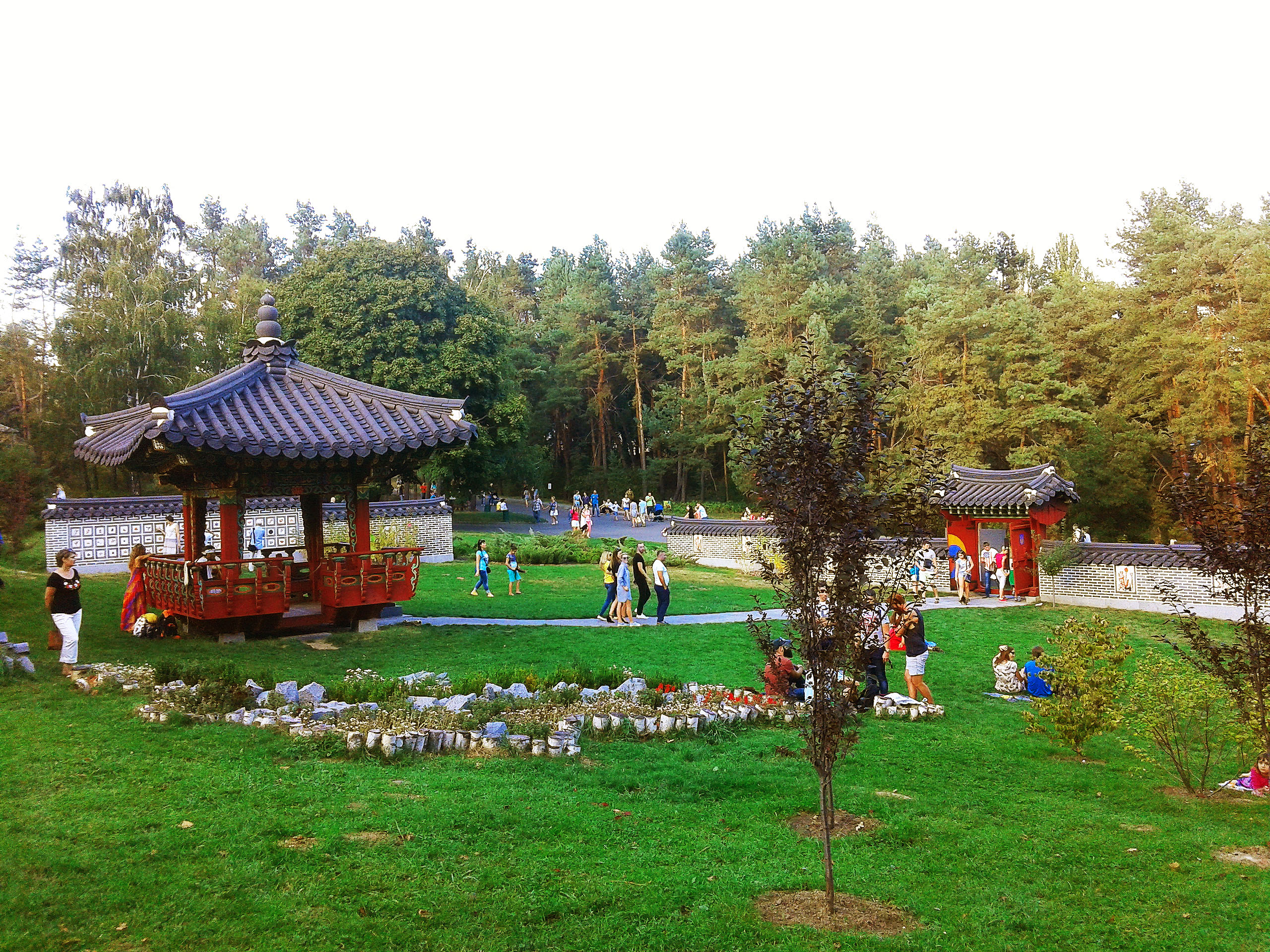 Корейський сад Чандук у Києві. Національний ботанічний сад імені Миколи Гришка НАН України